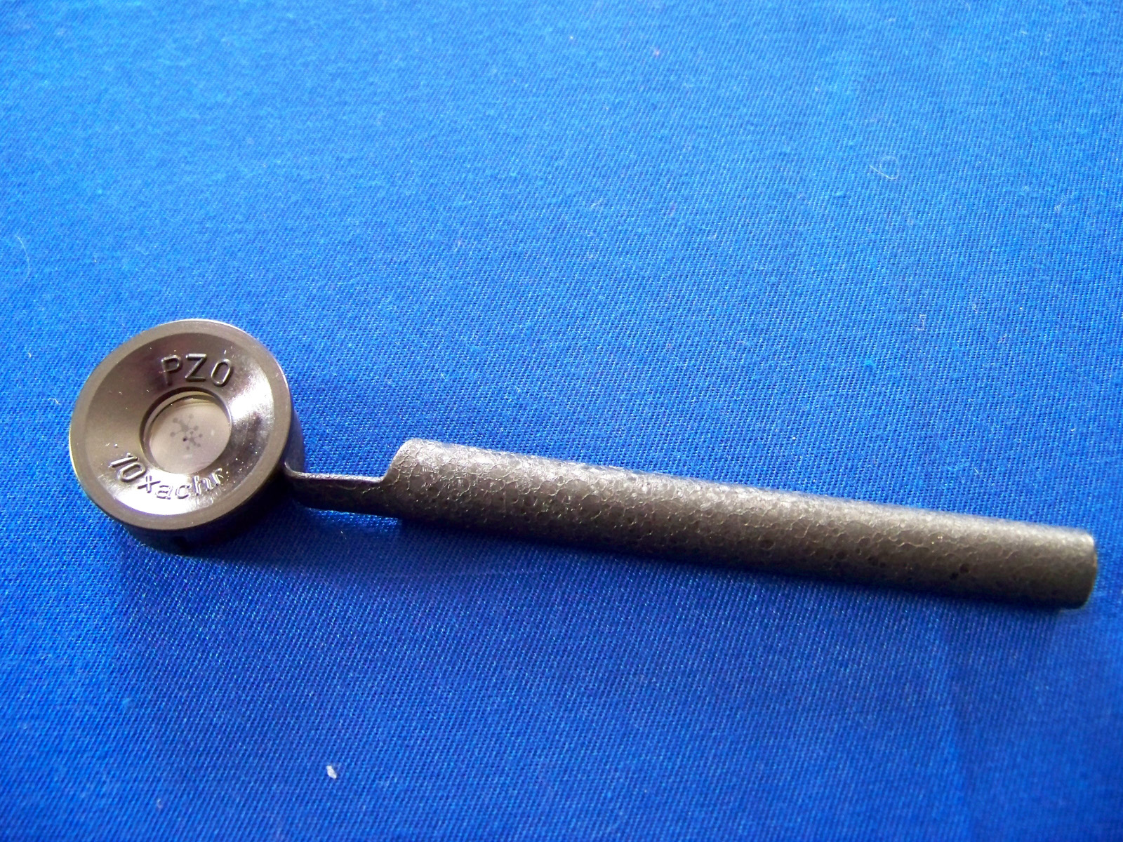 Lupa achromatyczna 10x PZO